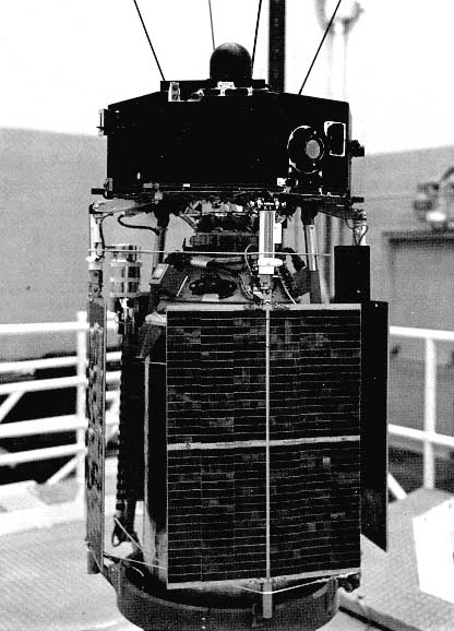 Explorer-41 (IMP-G) satellite